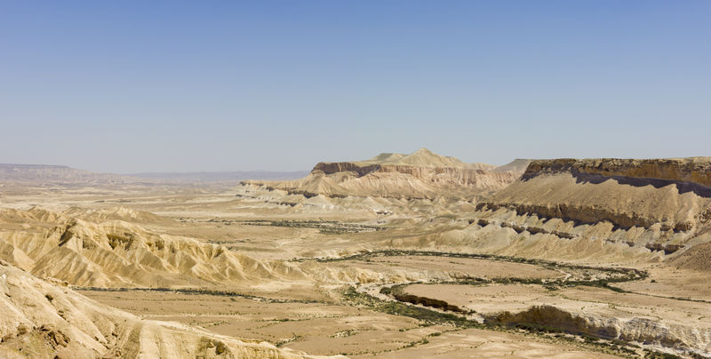 صورة لعين عبده